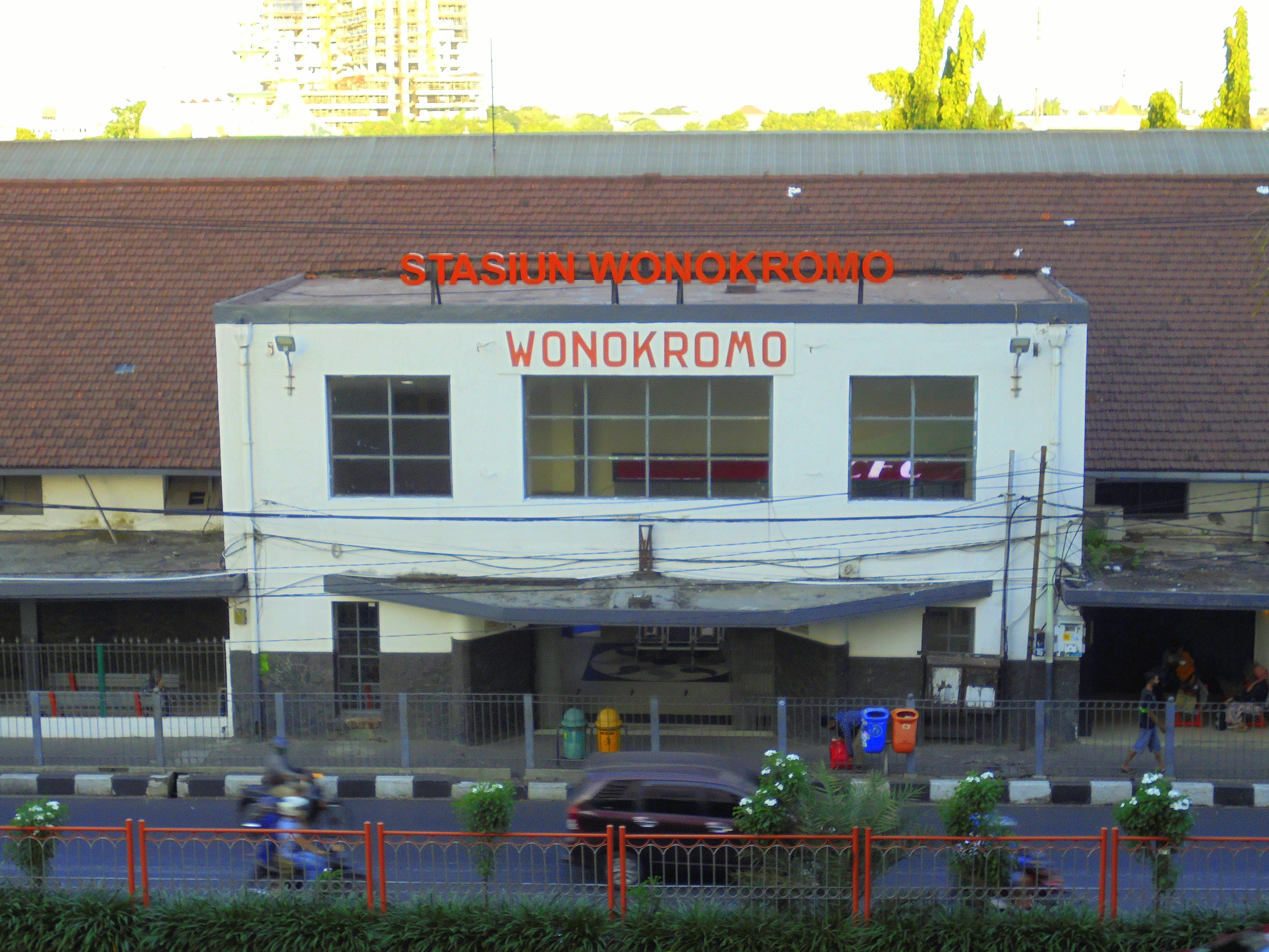 Tampak depan Stasiun Wonokromo, Surabaya, 2020